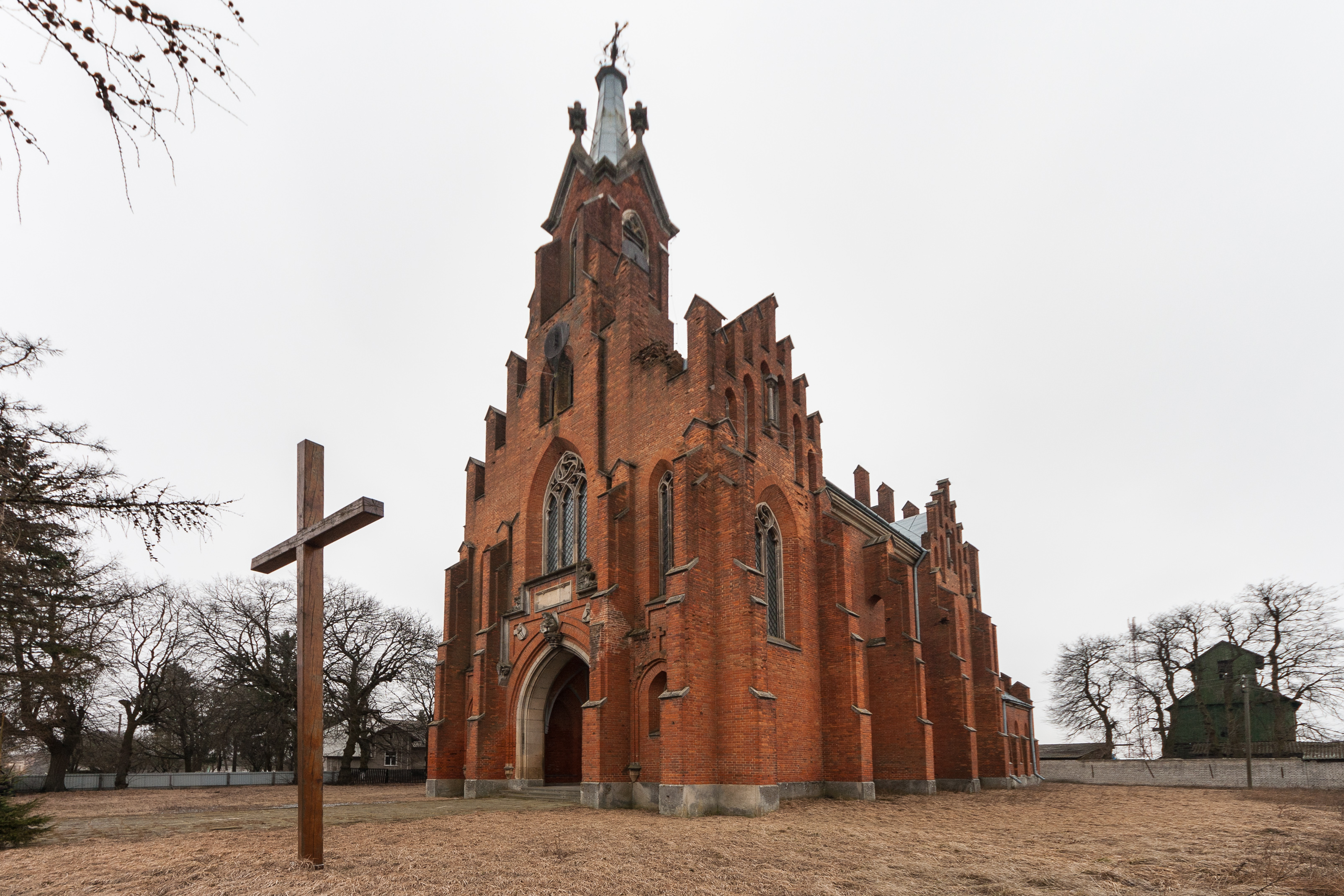 Костел (мур.), с. Озеряни